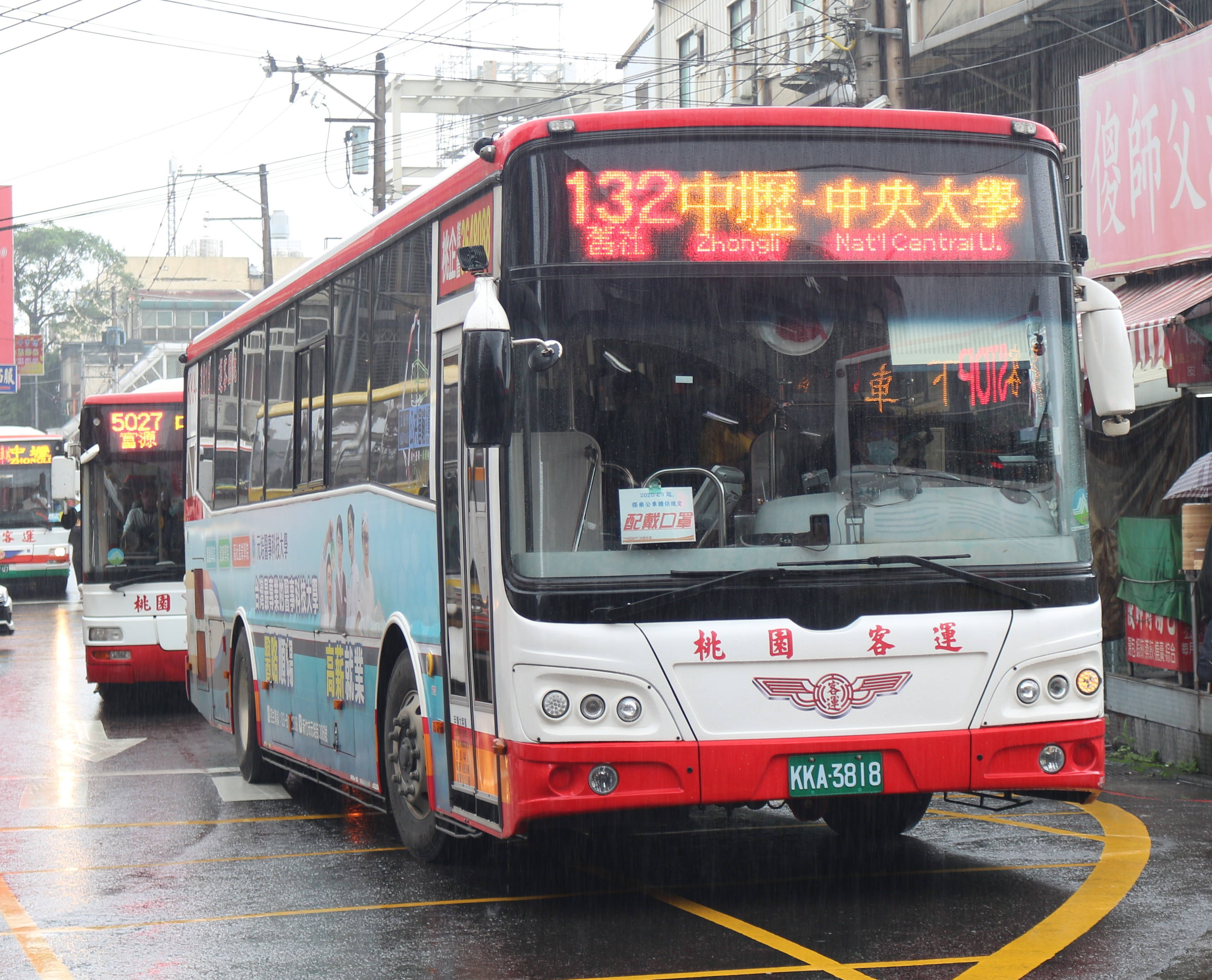 桃園客運 2018 Fuso RM11FN1XE KKA-3818 132